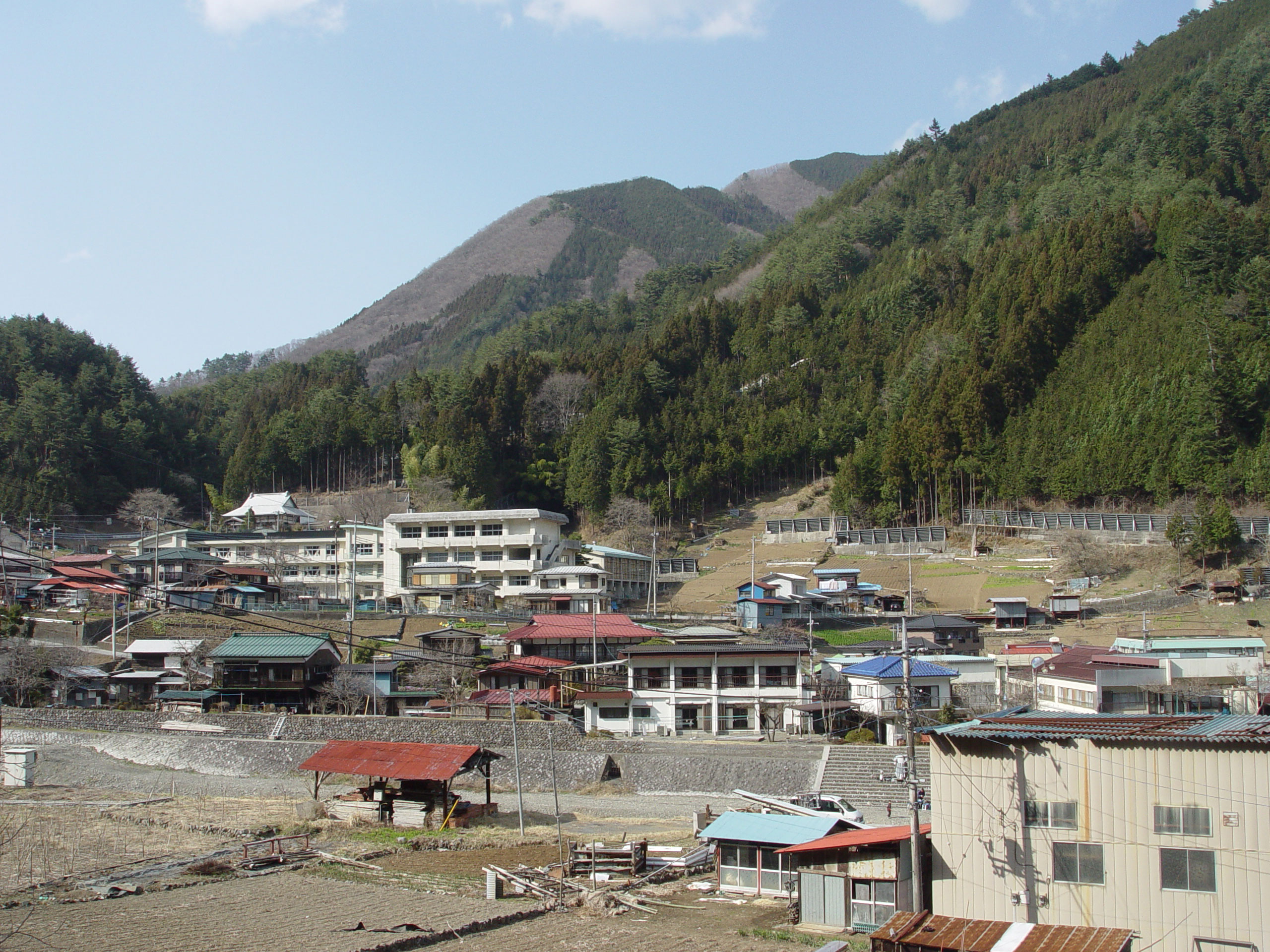 View of Kosuge Village ja: 小菅村遠景